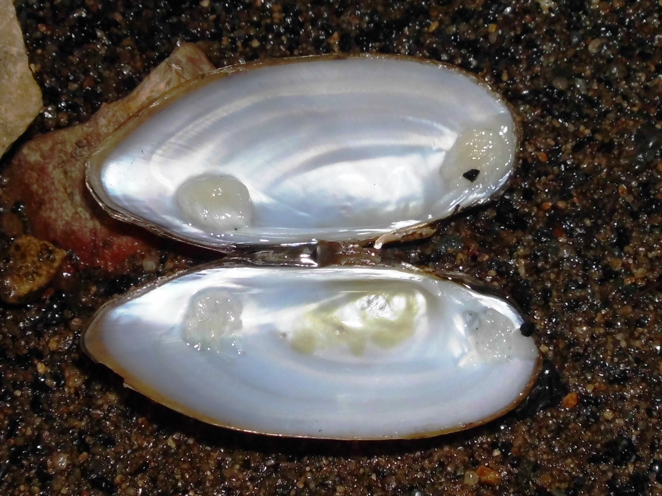 Раскрытая раковина молодой перловицы обыкновенной. Вид изнутри. Верхнеуфалейский пруд в городе Верхний Уфалей на реке Уфалейка, юго-восточный берег.